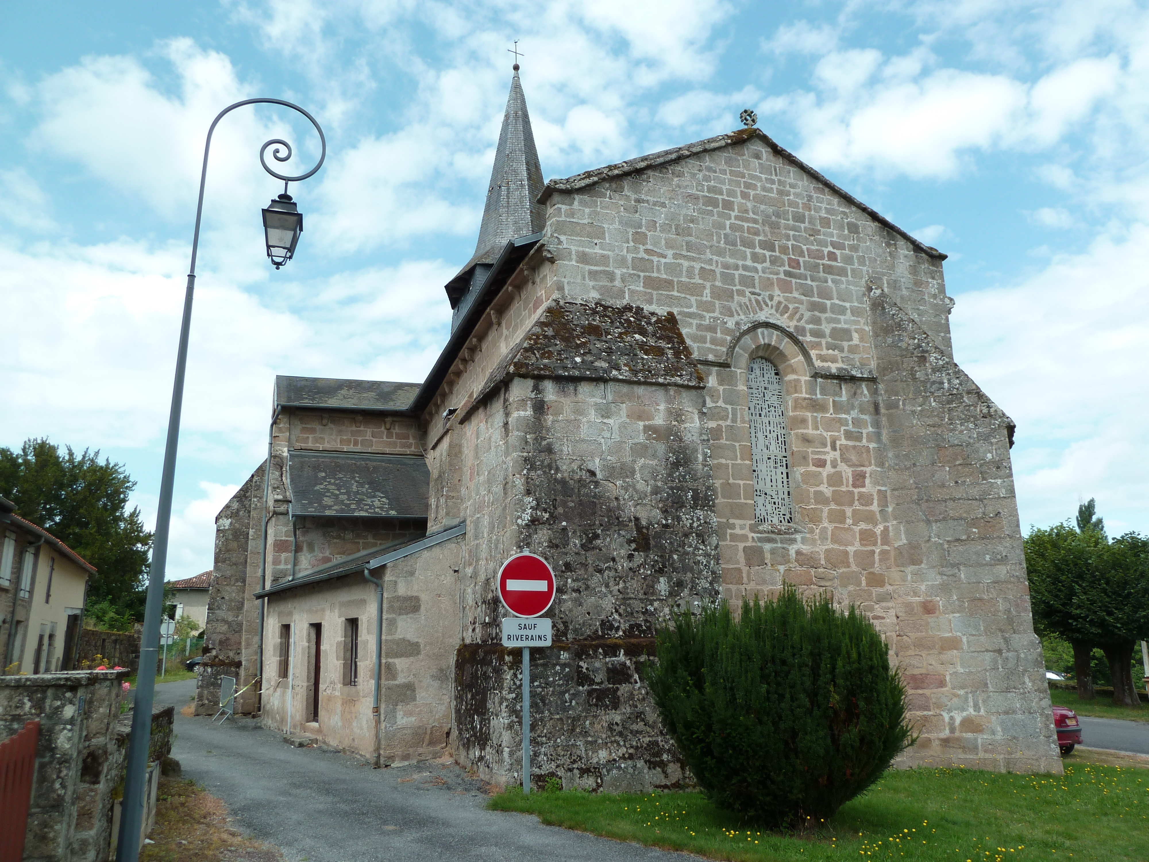 Eglise de Razès Haute Vienne Chevet